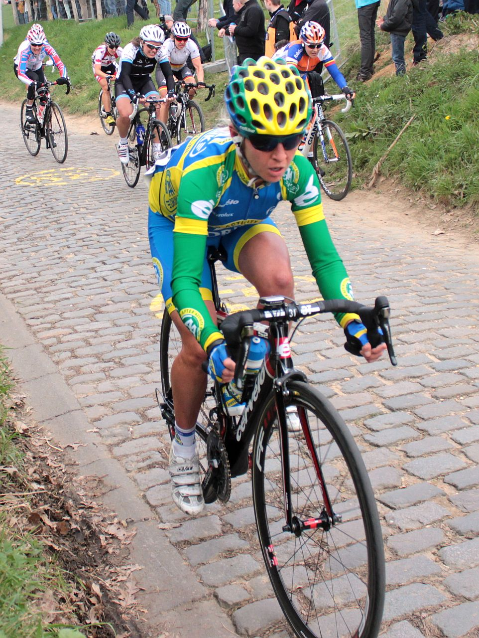 Emma Pooley riding in the 2012 Tour of Flanders for Women (Dutch: Ronde van Vlaanderen voor Vrouwen)